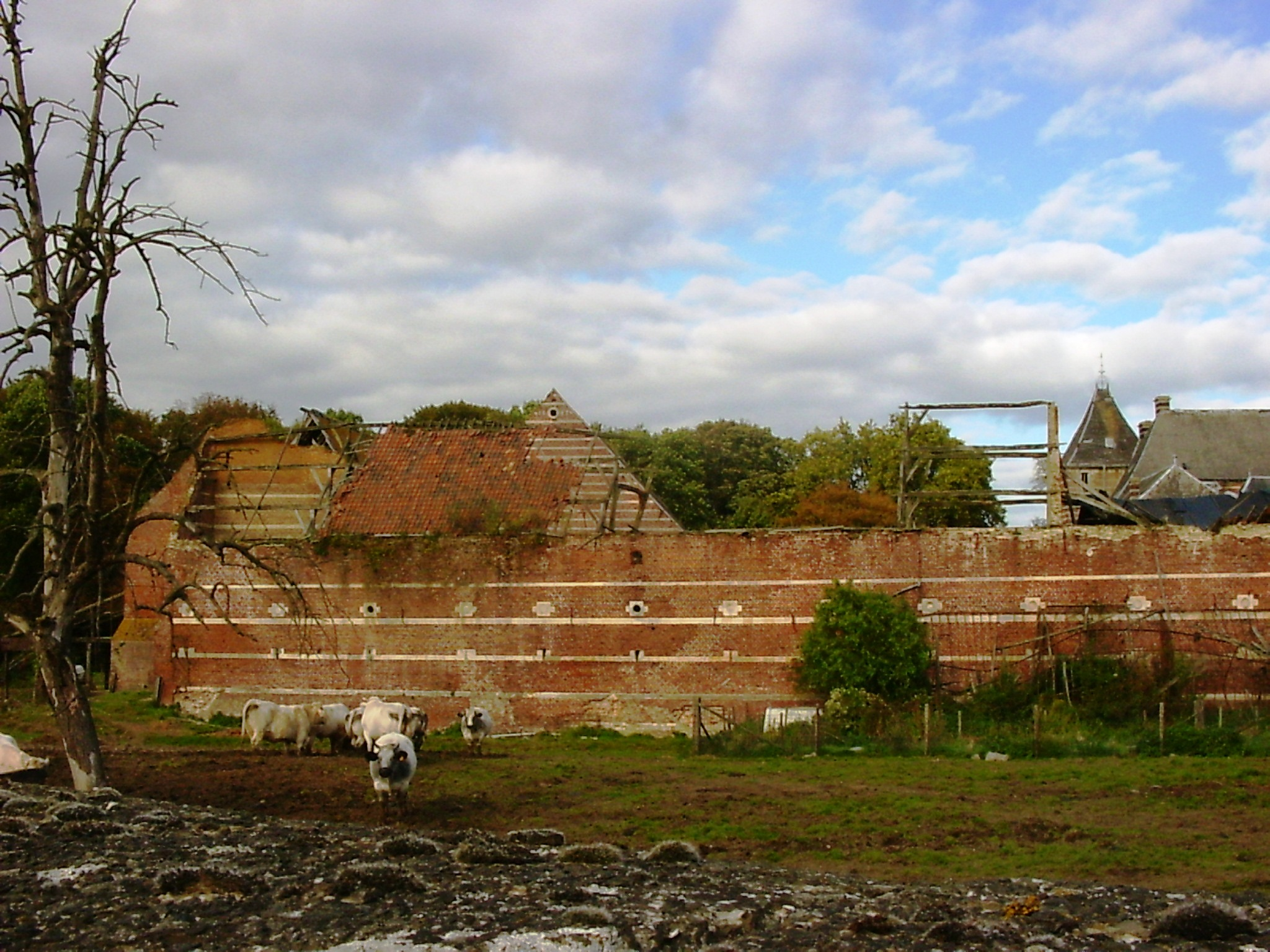 Kasteelhoeve van Heers - eigen foto